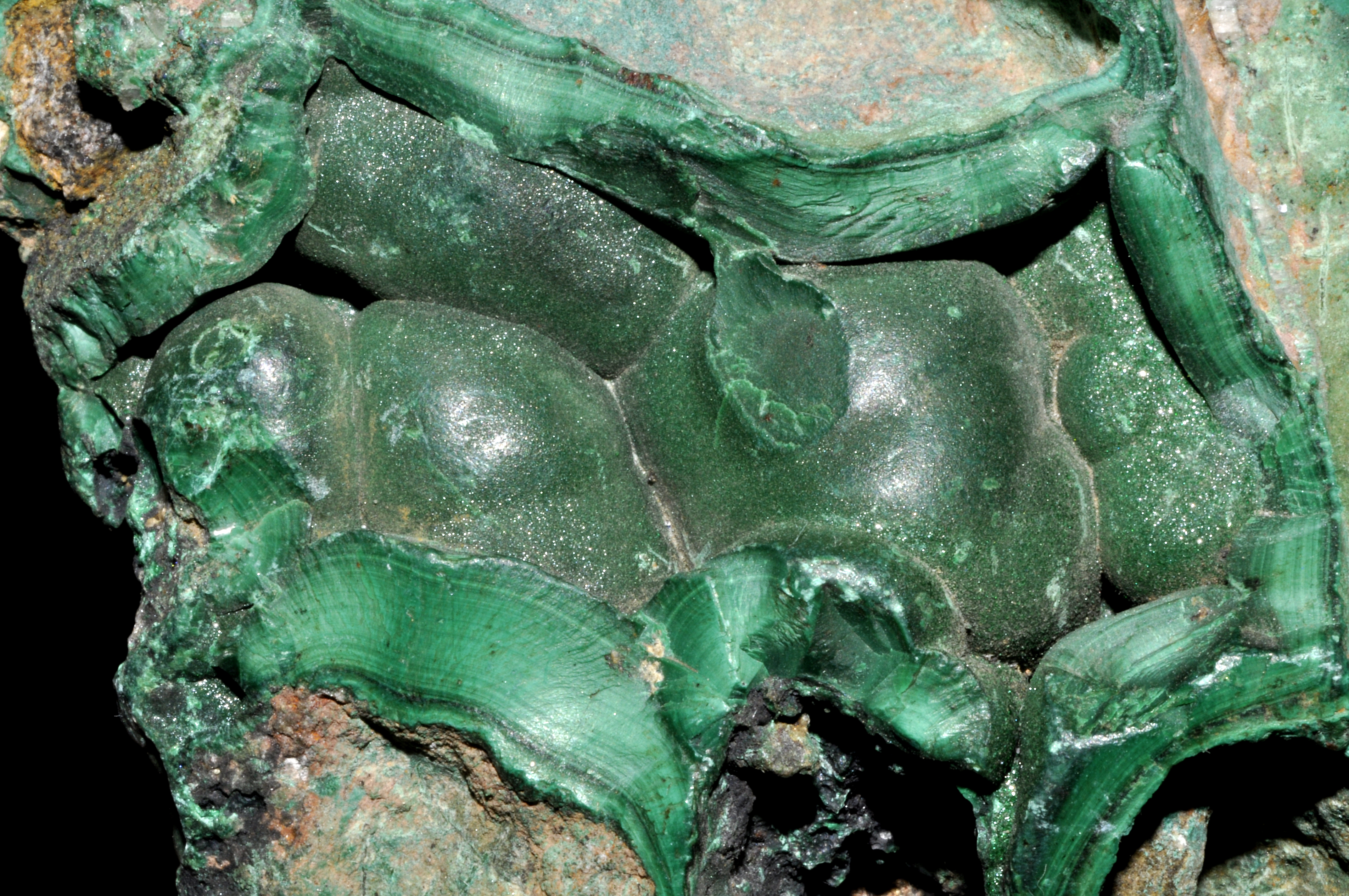 Malachite mamelonnée